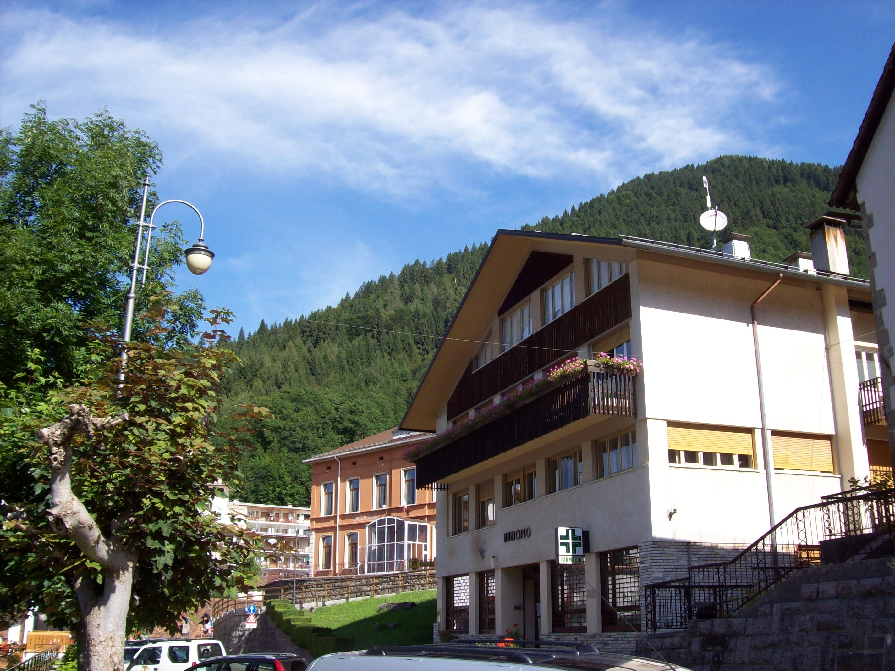 Scorcio del centro di Ravascletto (UD) Italia, con il municipio e le scuole